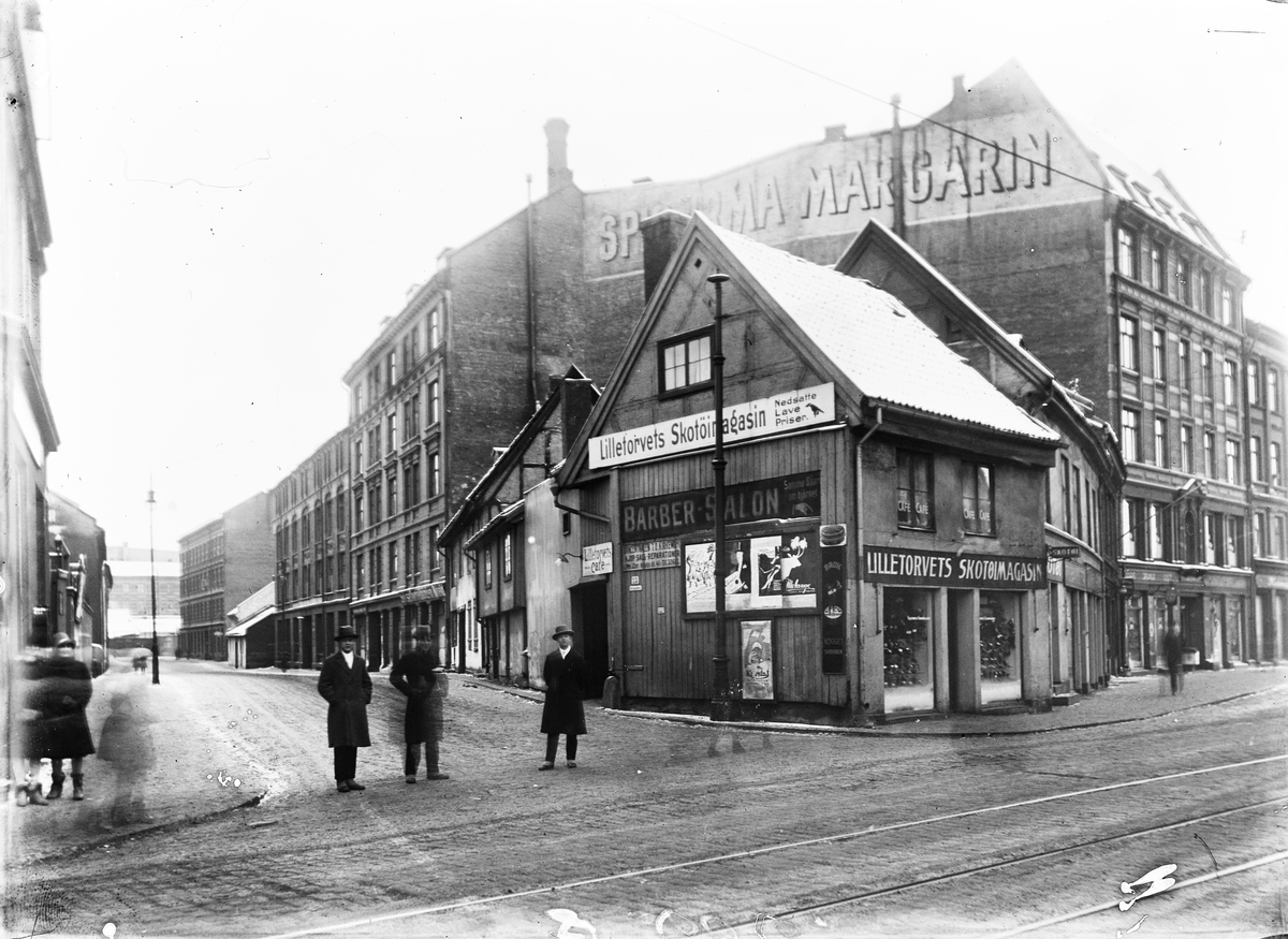 Christian Krohgs gate fra Brugata. Brugata 9, Brugata 11, Christian Krohgs gate, Lilletorget, gatekryss, gateløp, forretningsgårder, mennesker. Oslo (sted) Vaterland (sted) Brugata 9 (sted) Norge, Oslo, Vaterland, Christian Krohgs gate (utsikt over) Norge, Oslo, Vaterland, Christian Krohgs gate (utsikt over)